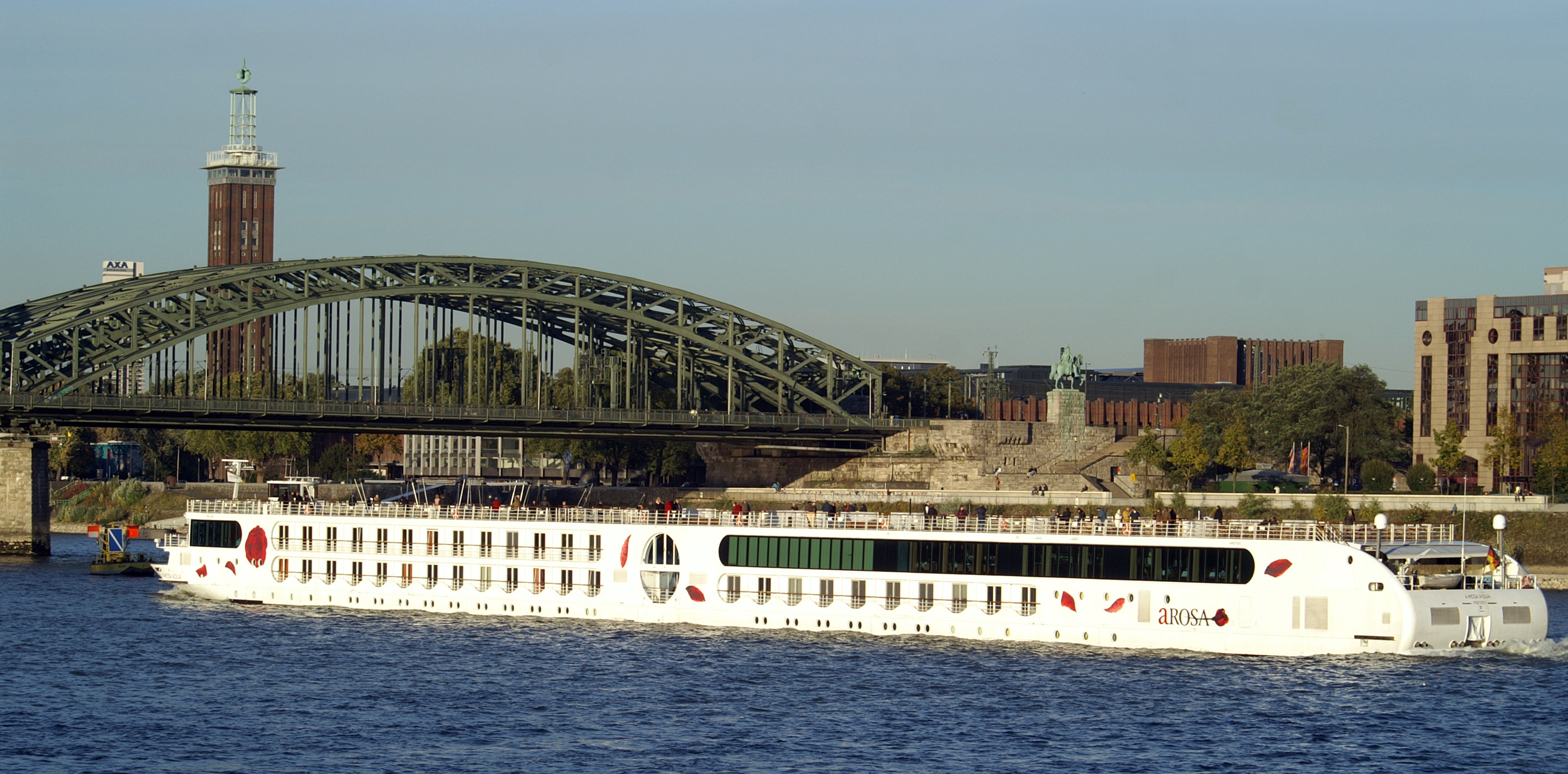 MS A-ROSA Aqua auf dem Rhein bei Köln